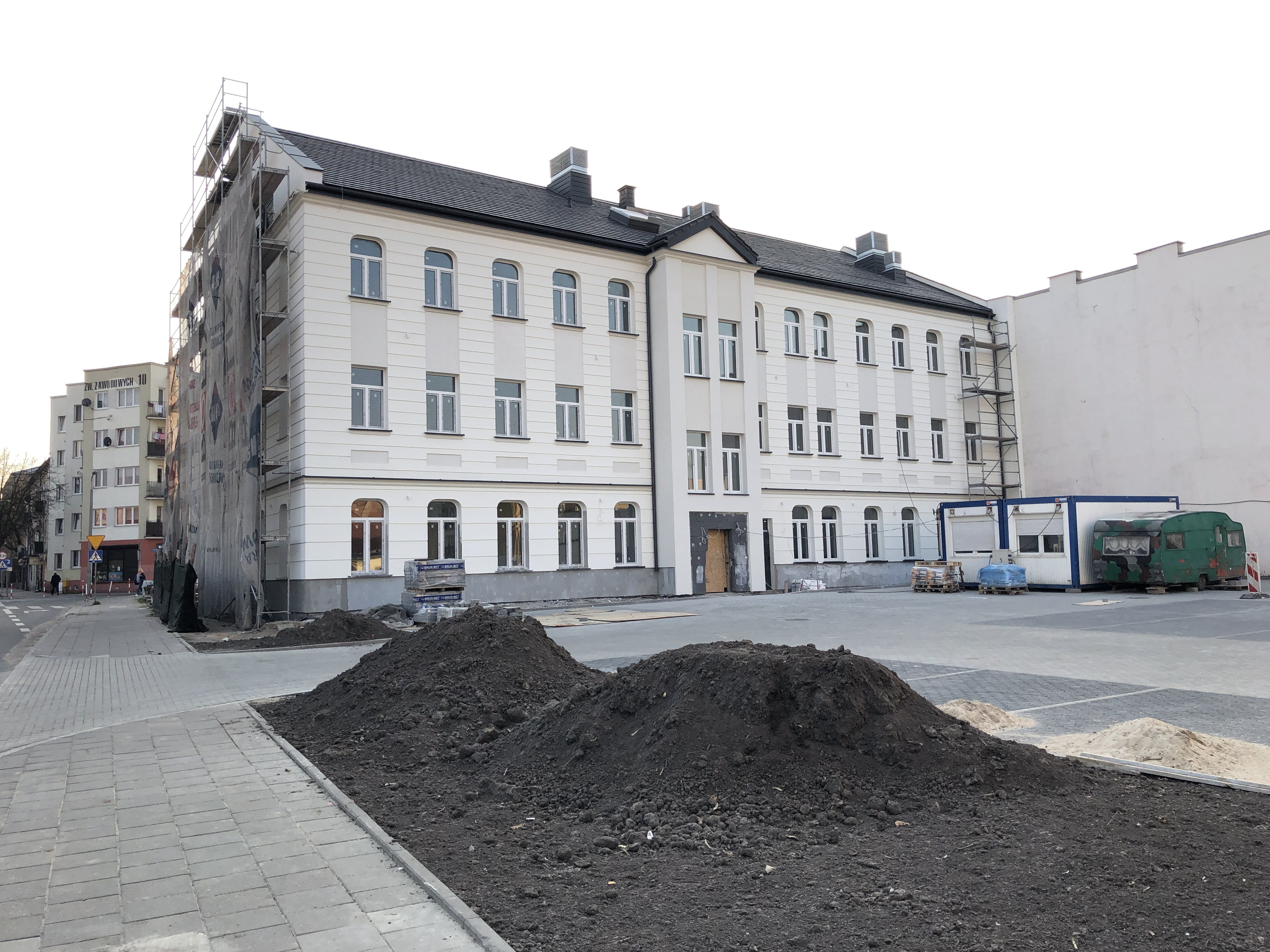 Nowy budynek Starostwa Powiatowego (2020 r.).